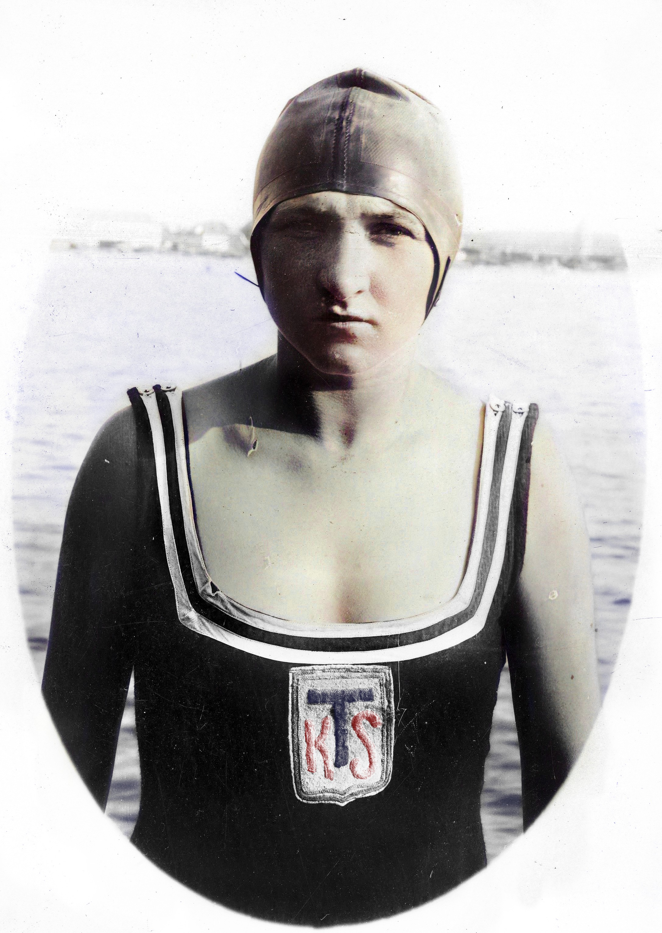 Gertruda Skowrońska, pływaczka TKS Toruń